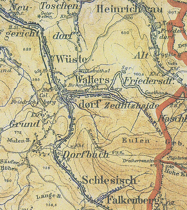 Wüstewaltersdorf auf einem Ausschnitt aus der Karte des Stadt- und Landkreises Waldenburg